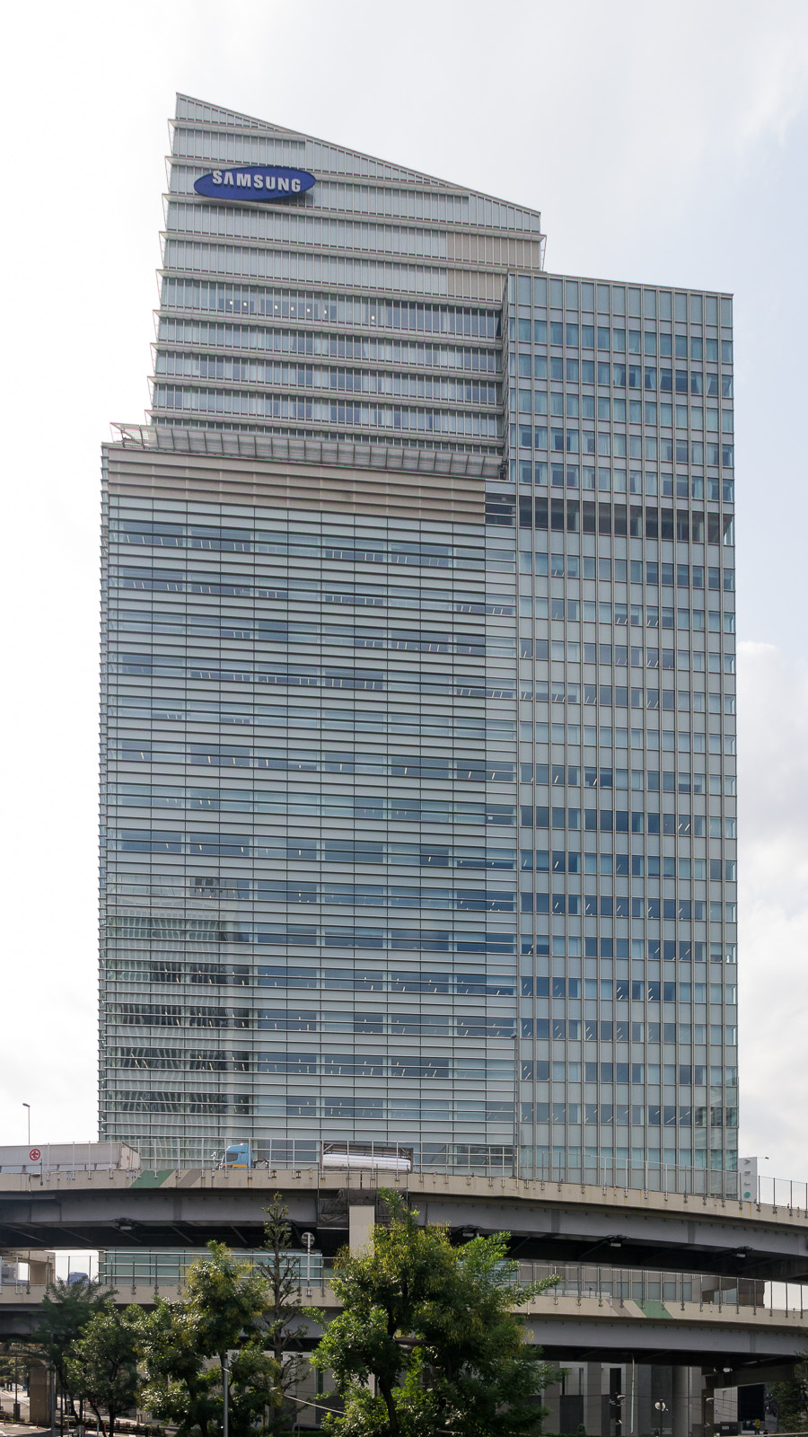 六本木T-Cube、東京都港区六本木3-1-1。